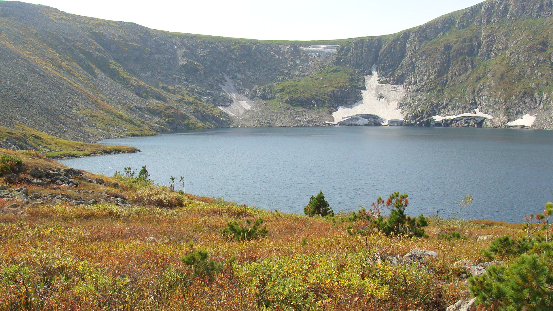 Самое глубокое озеро Кемеровской области - Среднетерсинское. Глубина около 60 метров.